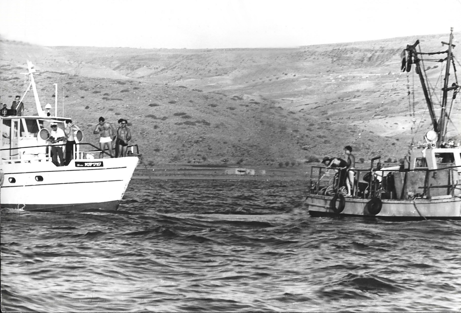 הספינה סוסיתא משמאל וסירת דייג סקלבה בימת הכנרת שסייעו לחילוץ סירת המשמר